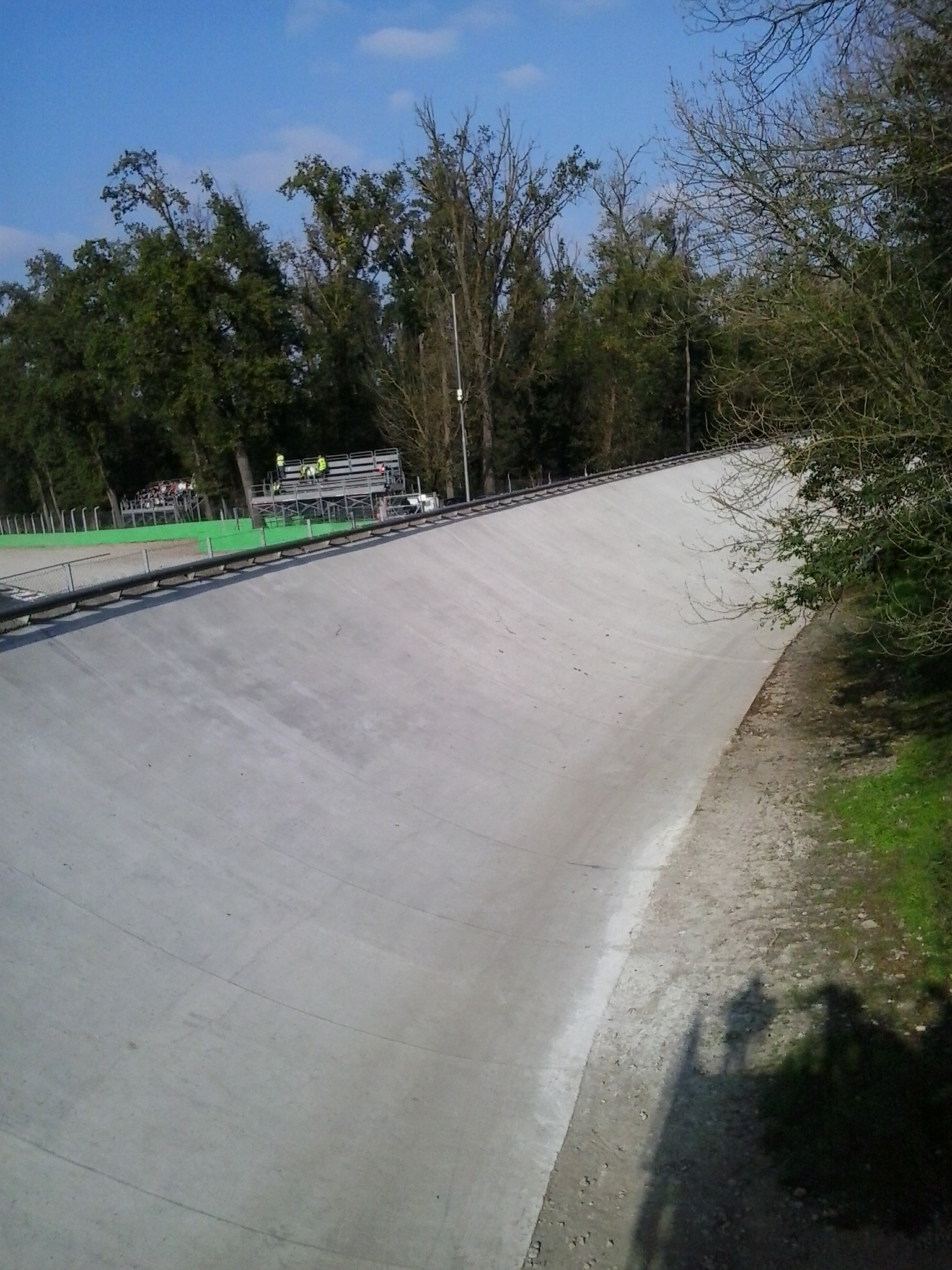 Foto dell'anello alta velocità dalla tribuna Alta velocità settore C dell'Autodromo Nazionale di Monza